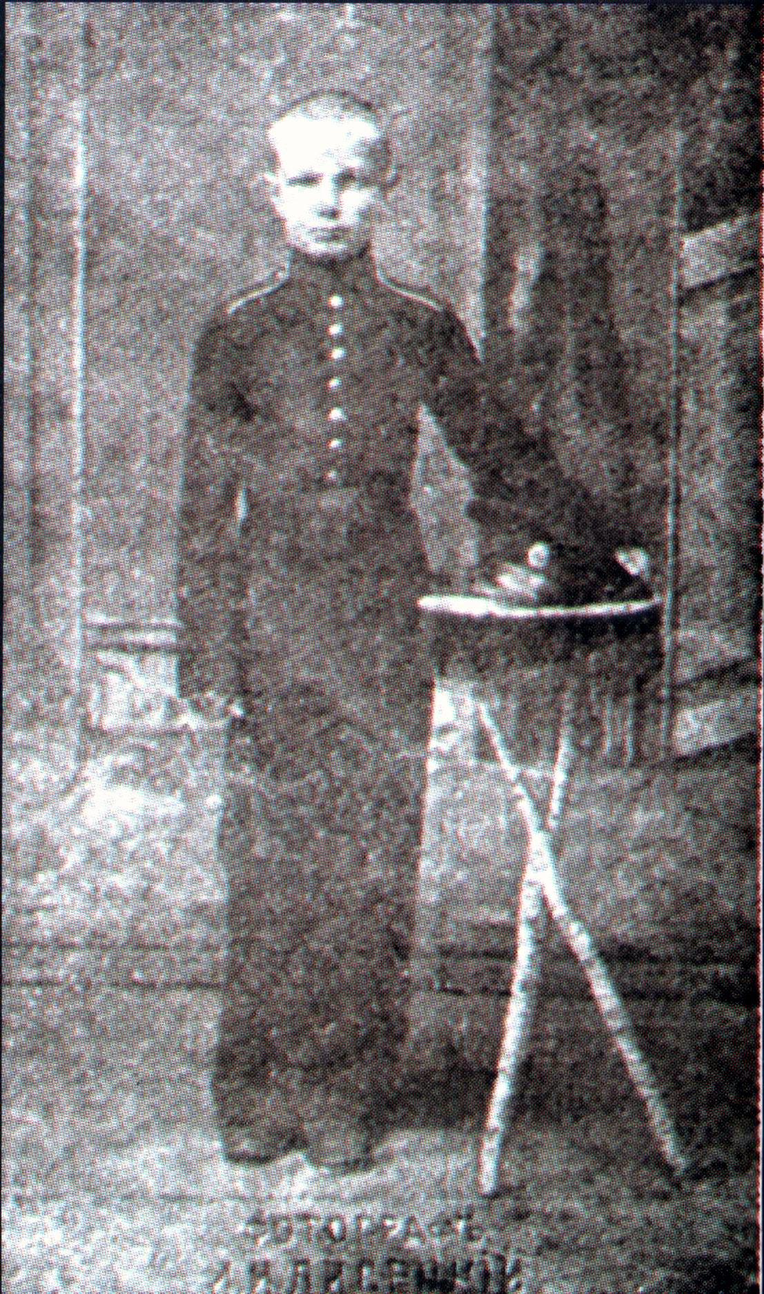 Кадет Михаил Дроздовский. Из журнала "Вестник Галлиполийцев в Болгарии"